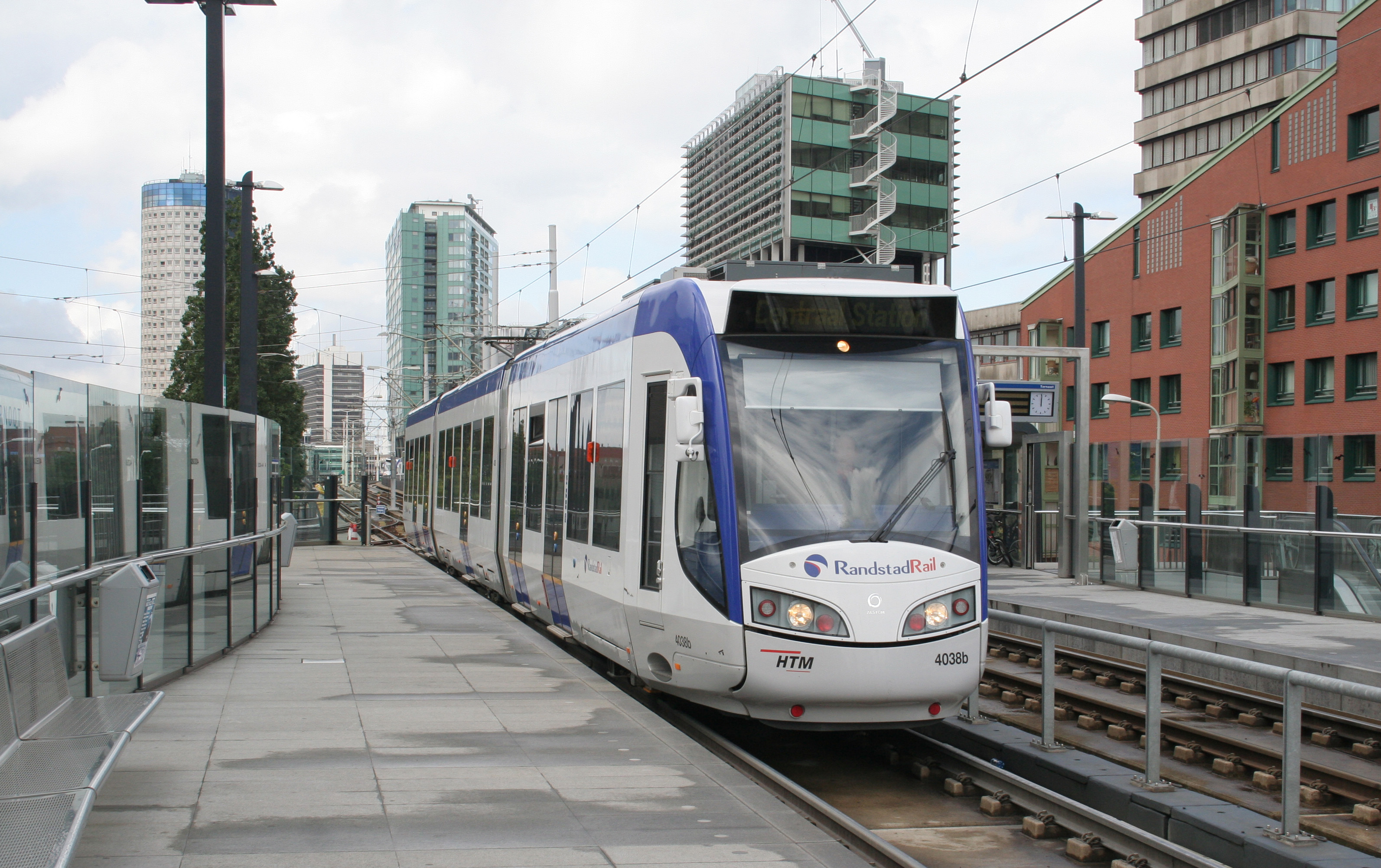 Randstadrailtram bij Den Haag